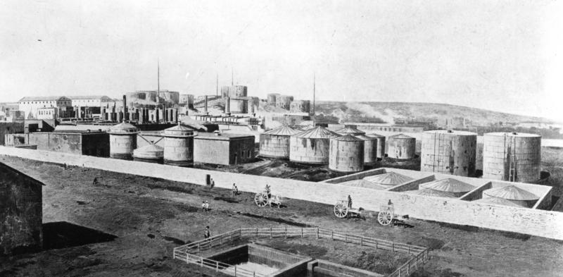 Baku, Erdöl-Tanks ADN-ZB/Archiv Rußland 1912 Erdöl-Tanks der Naphtagesellschaft Gbr. Nobel in Baku. 4170-12 [Scherl Bilderdienst] [Russland / Aserbaidschan.- Erdöltanks der Nobel Brothers Petroleum Producing Company, Gründer war Robert Nobel]